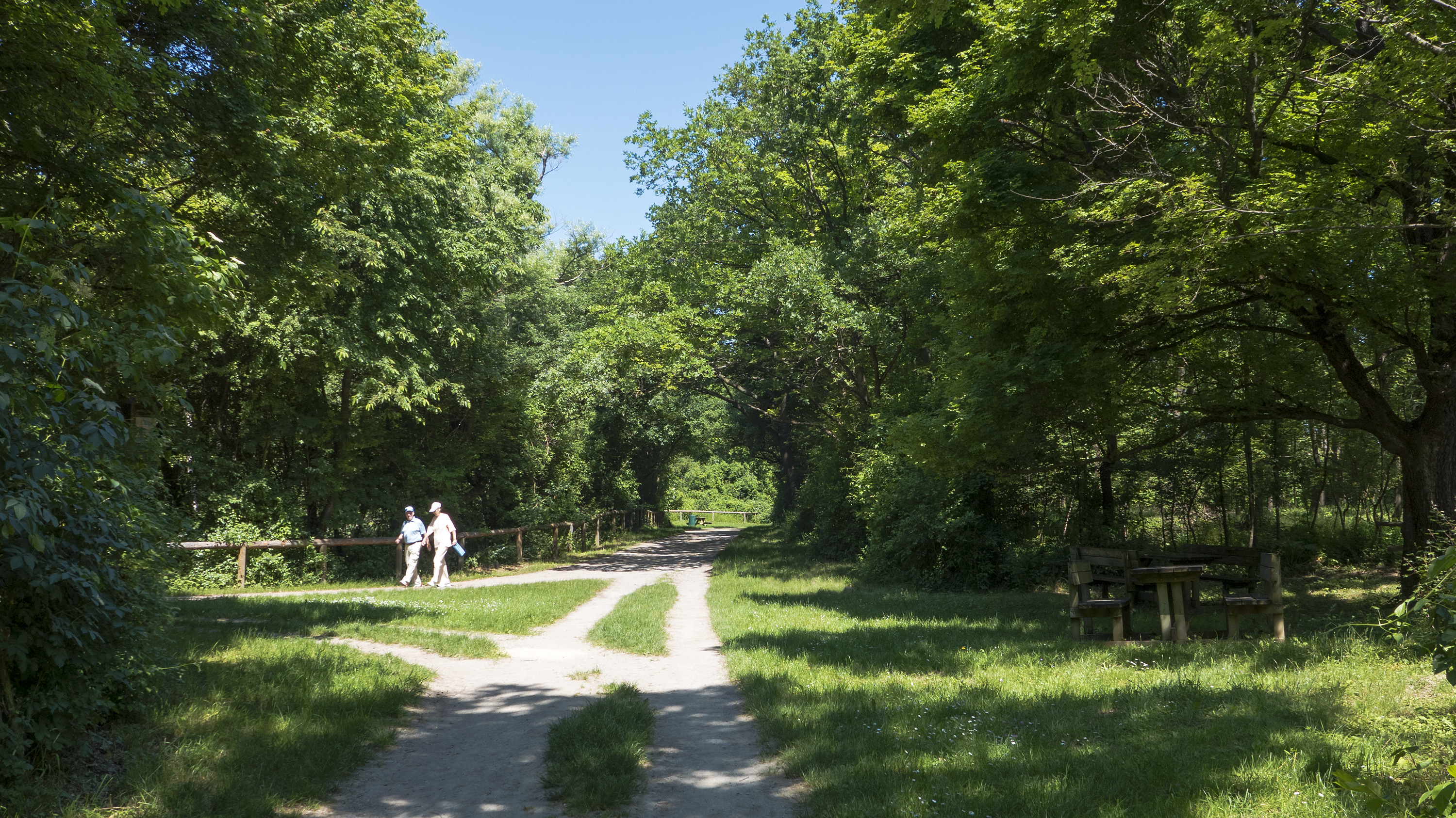 Laaer Wald in Wien 10